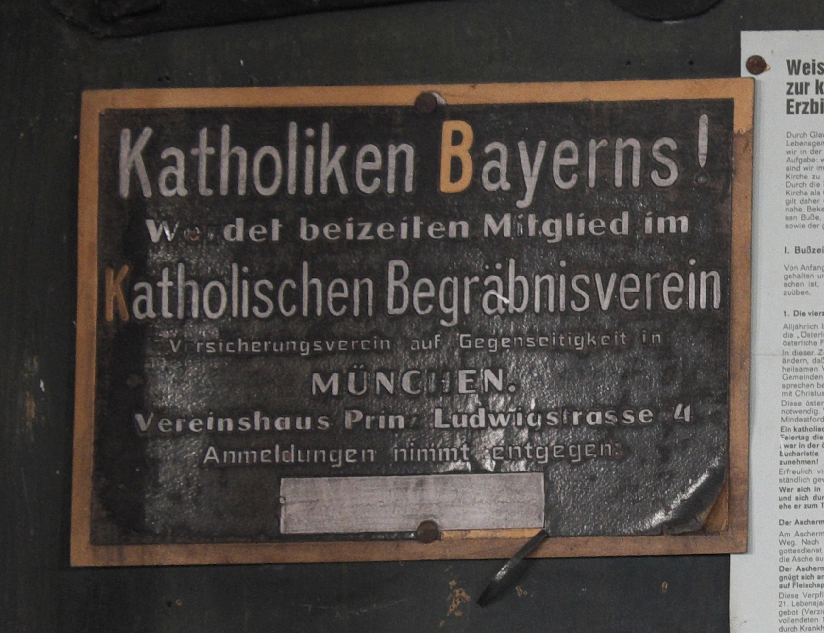 Katholische Filialkirche St. Martin in Niederstraubing (Steinkirchen) im Landkreis Erding (Bayern/Deutschland)